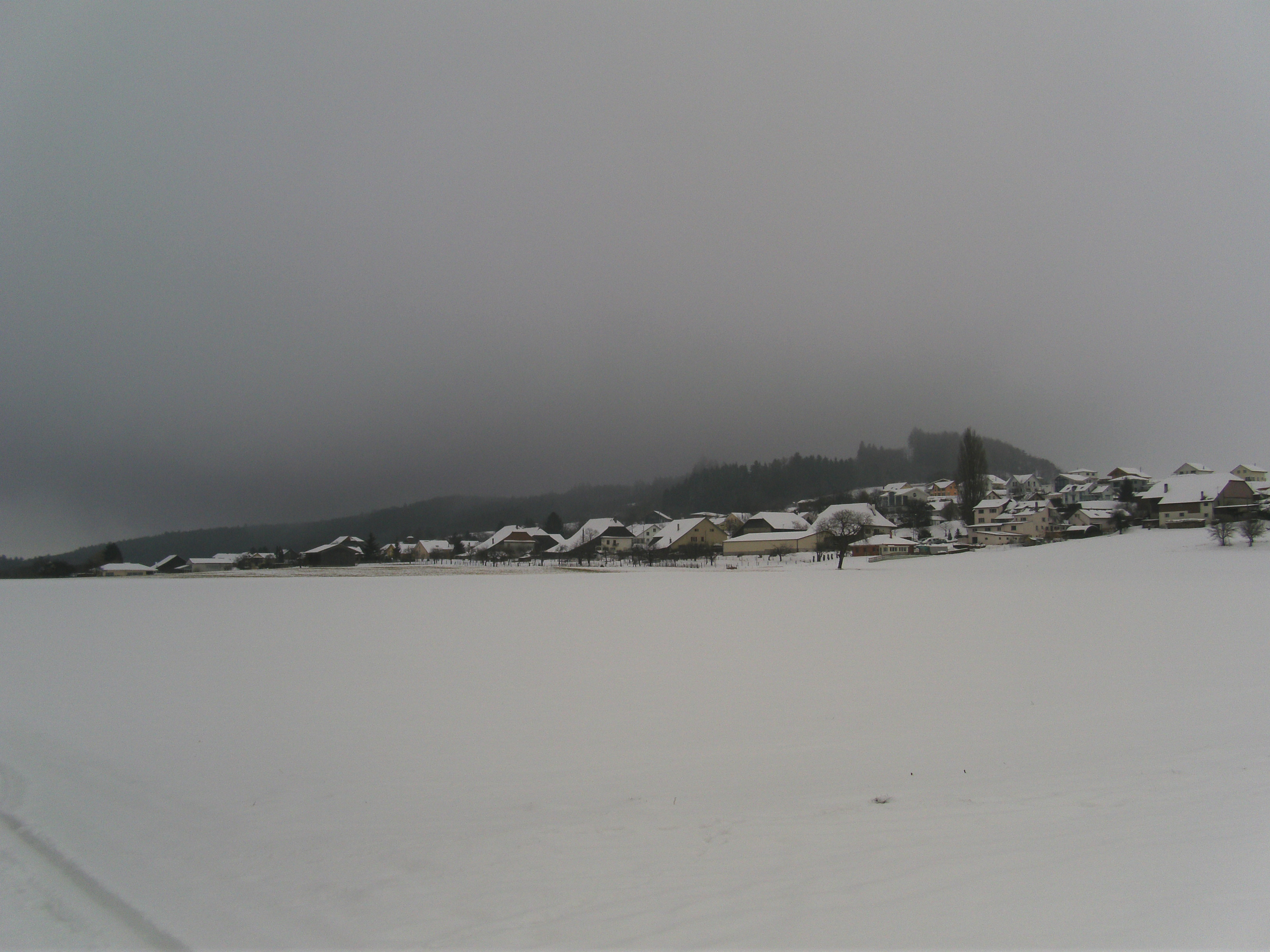 Chabrey sous la neige